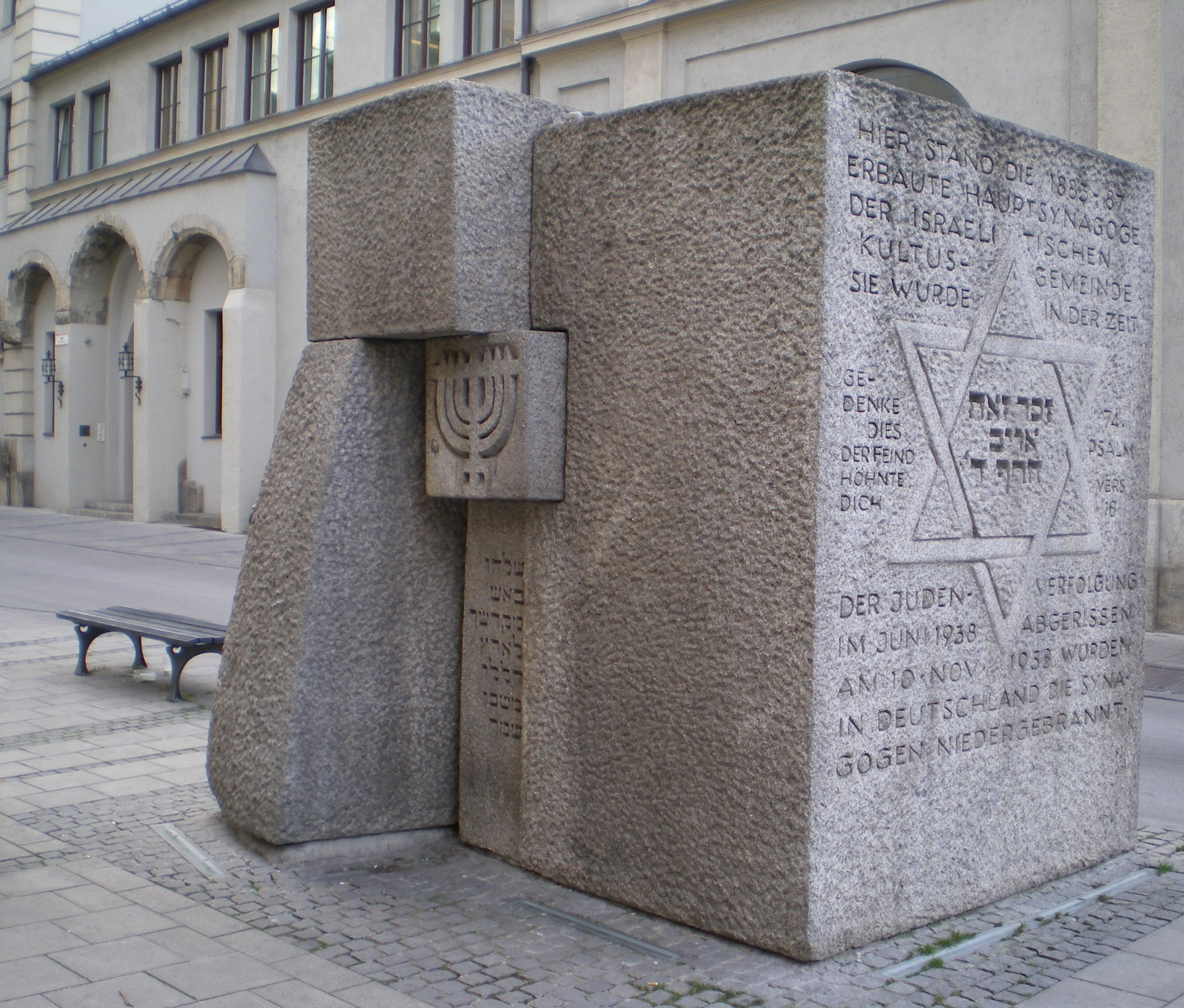 בת הזיכרון לבית הכנסת הישן במינכן